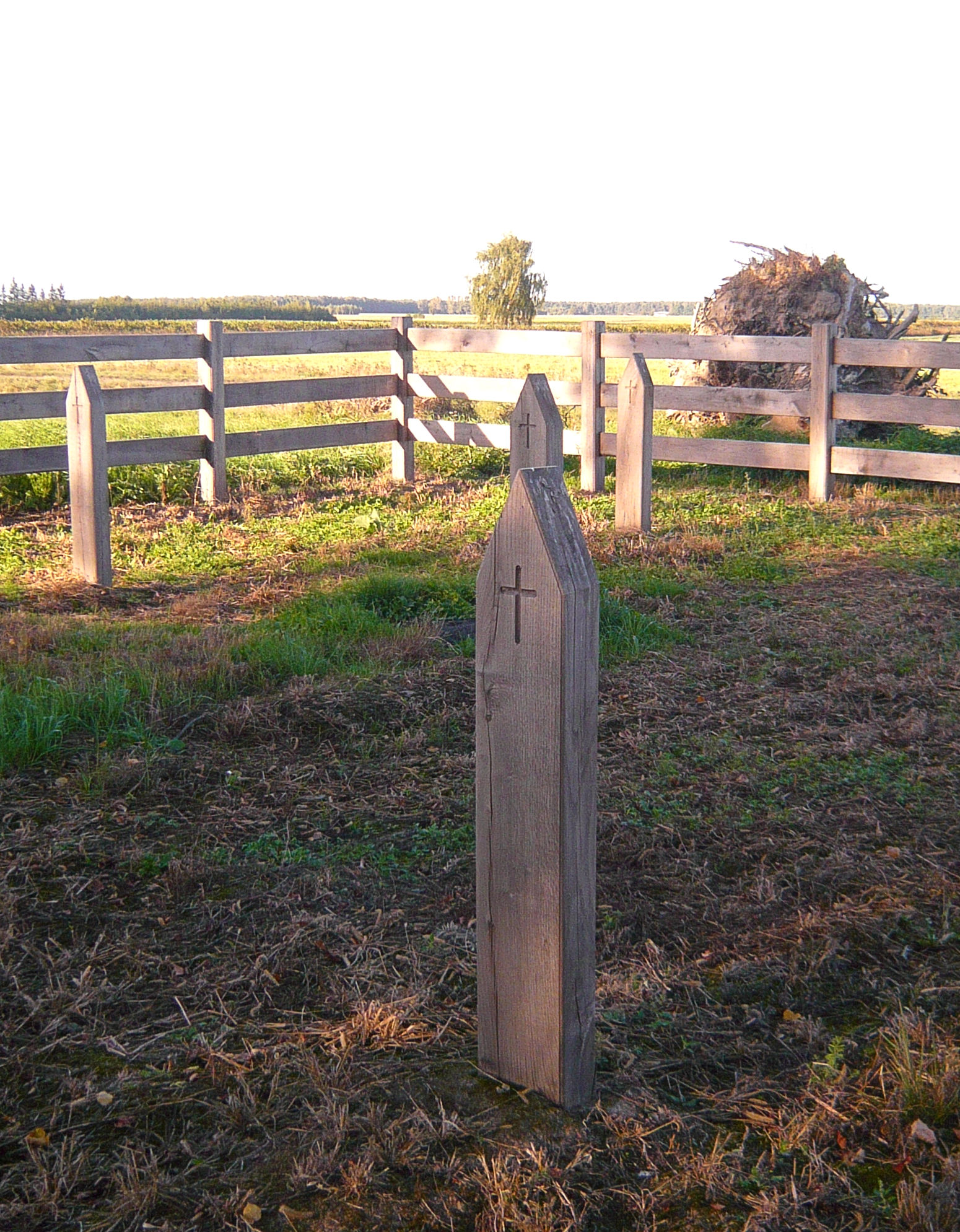 Cmentarz wojenny w Dratowie z 1915 roku